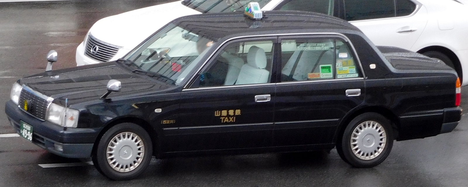 大阪山陽タクシーのクラウンコンフォート